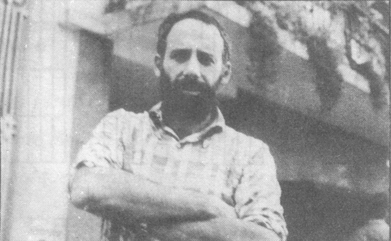 Fotografía del escritor, poeta y periodista argentino Miguel Grinberg, tomada en Argentina para la revista "Canta Rock", año 1 nº10 de 1983.